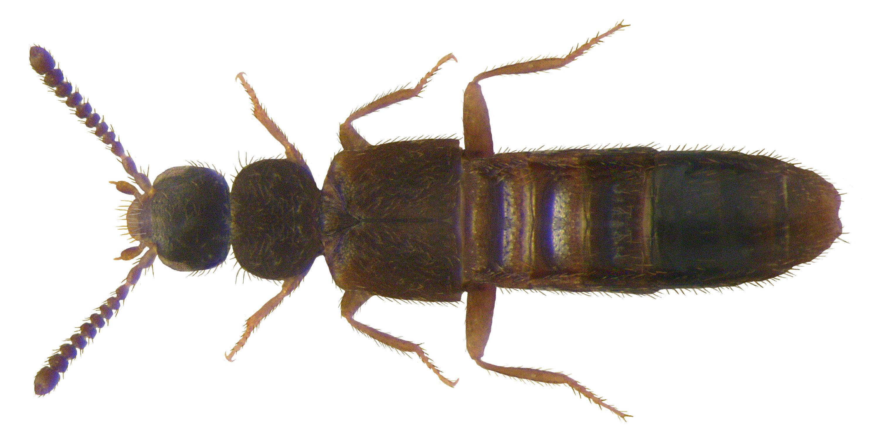 Familie: Staphylinidae Groesse: 1,7-1,9 mm Verbreitung: Europa Ökologie: an Faulstoffen Fundort: Germania, Bayern, Oberfranken, Selbitz leg.det. U.Schmidt, 1982 Photo: U.Schmidt, 2009